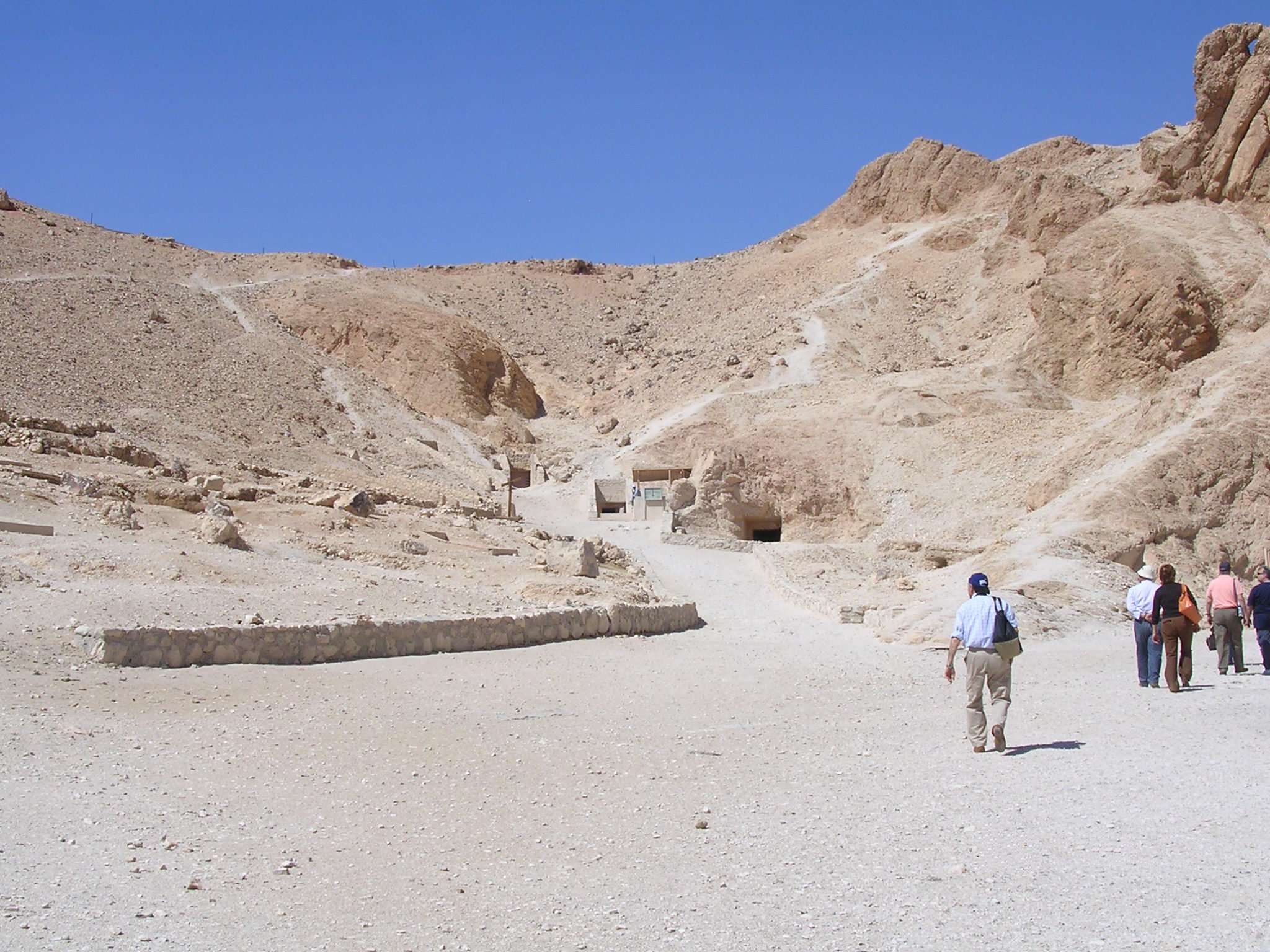 A Királynék Völgye (Egyiptom, Théba, nyugati part, Királynék Völgye)